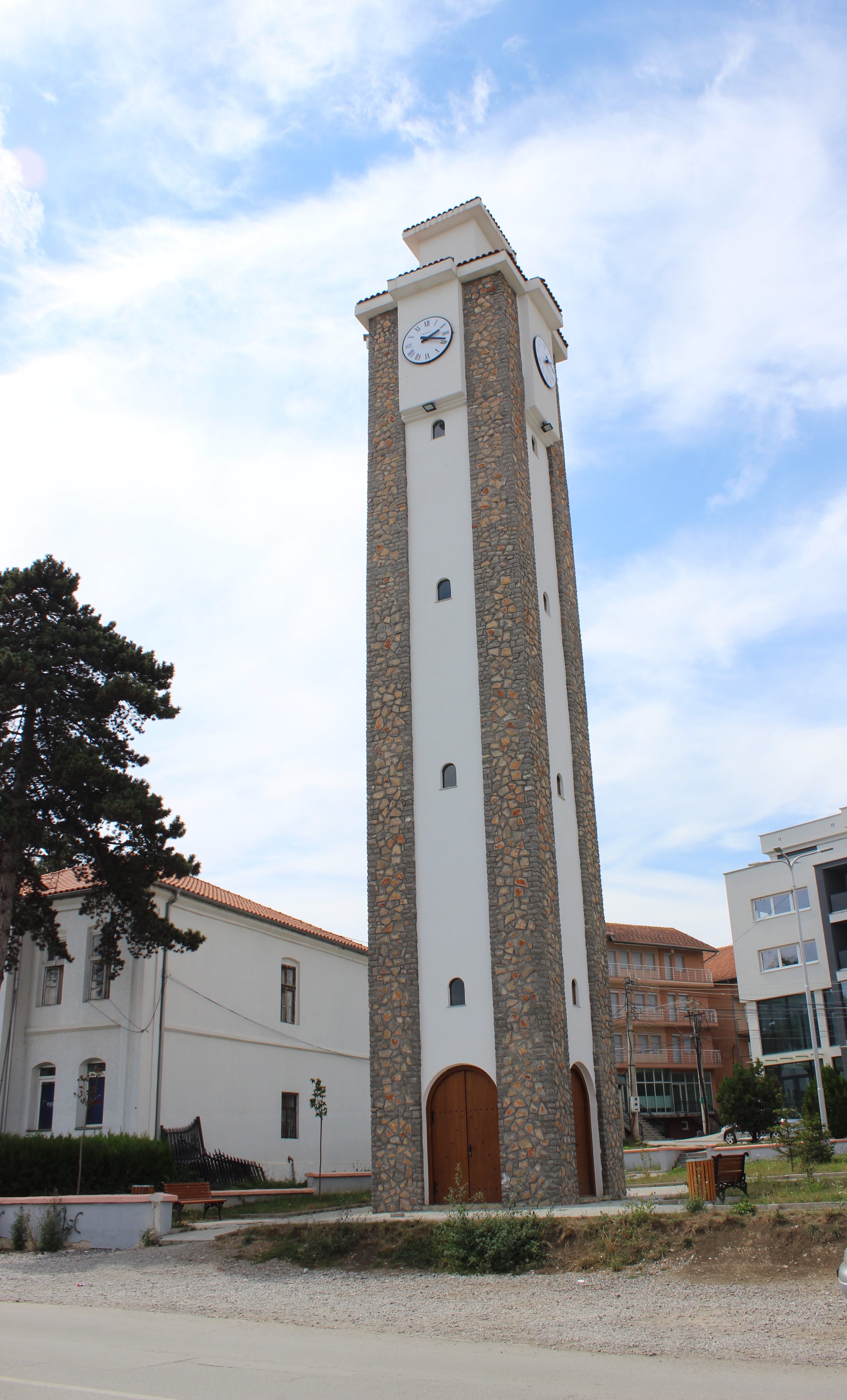 Sahat Kulla, Gjilan